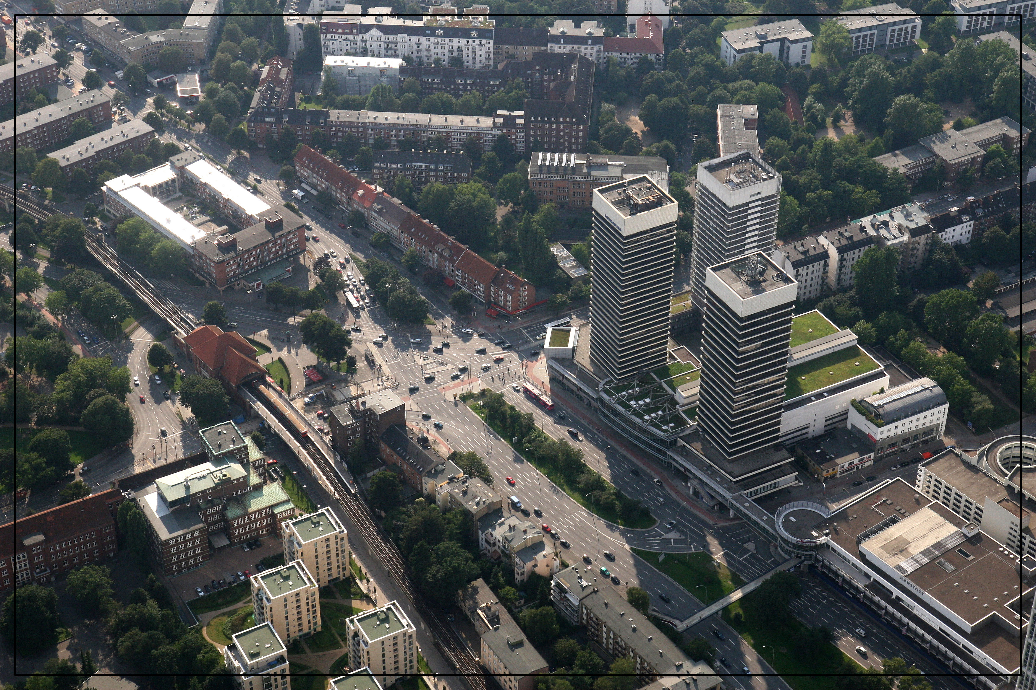 Luftaufnahme der Mundsburgtowers & Friedrich-Schütter-Platz